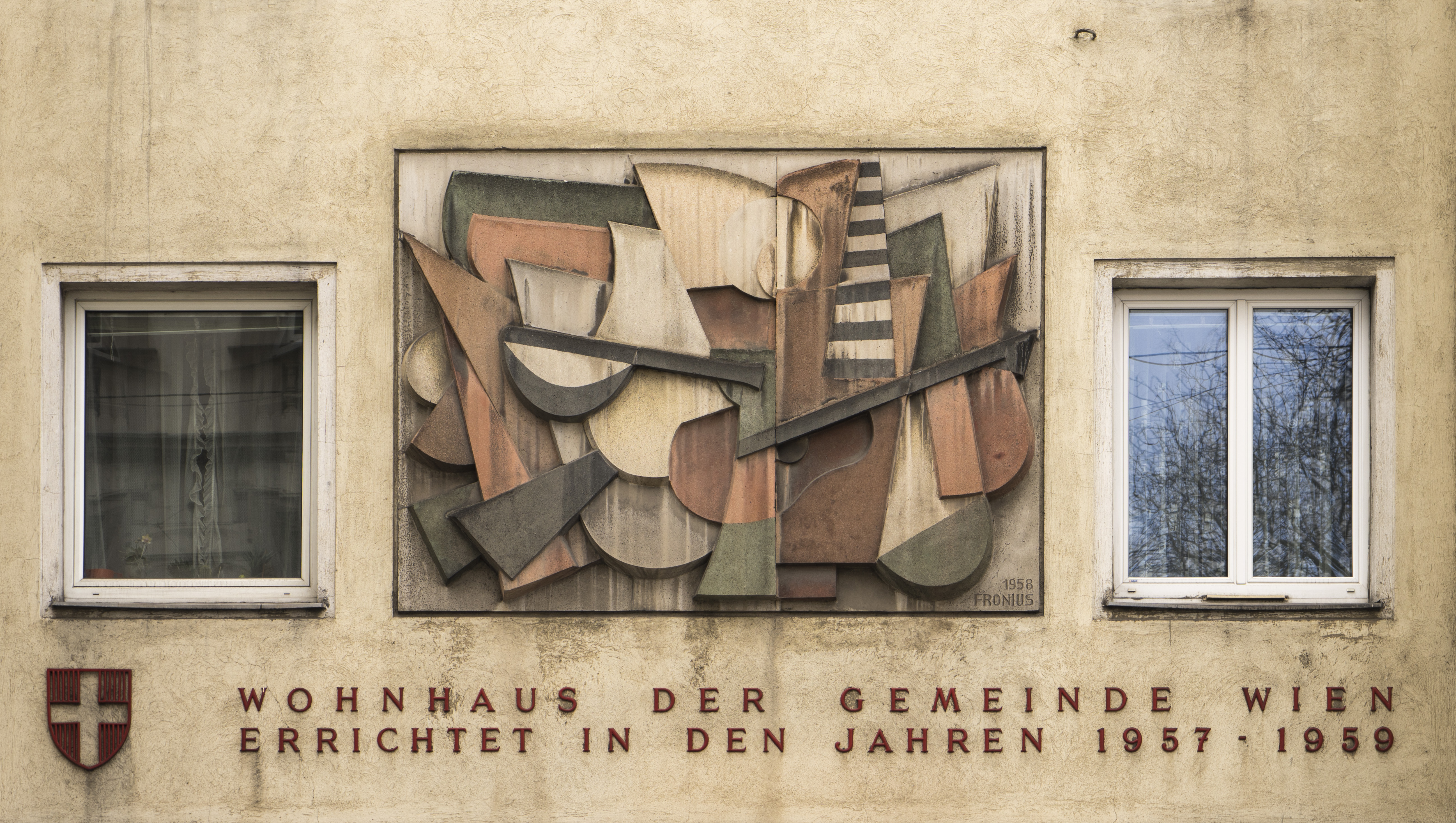 Wohnhausanlage Liechtensteinstraße 131-133 This media shows the Vienna residential building (Gemeindebau) with the ID 690. Object location48° 13′ 47.36″ N, 16° 21′ 21.22″ E